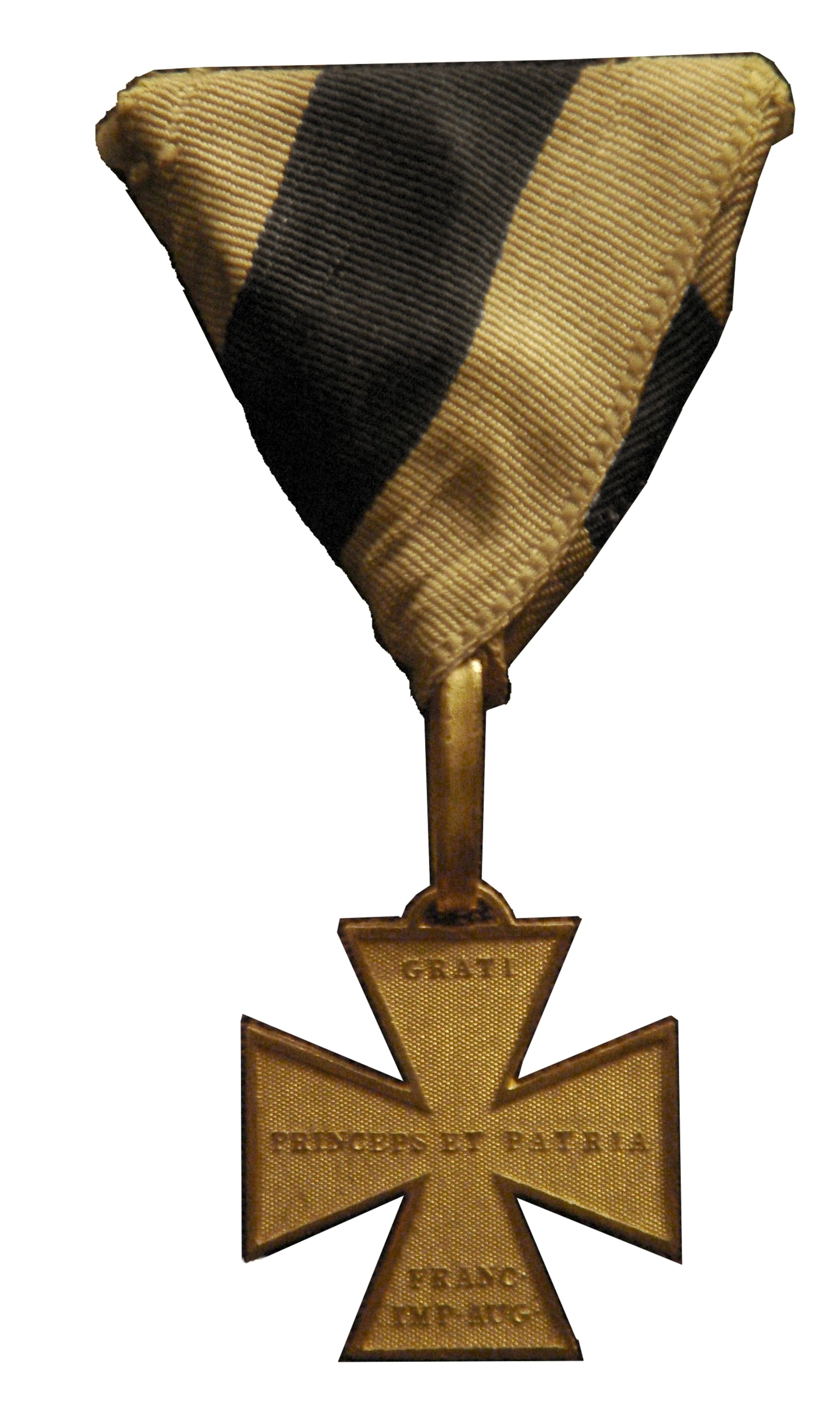 goldenes Zivil Ehrenkreuz 1813 1814, Schatzkammer in Wien